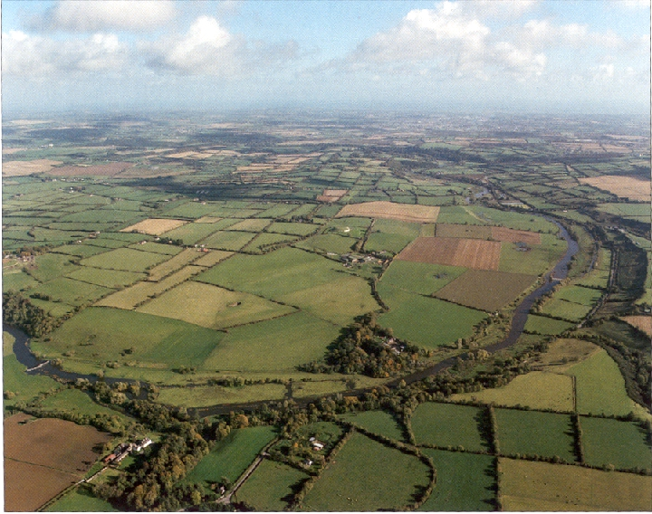 Brú na Bóinne légi felvétele a Boyne folyó kanyarulatával.